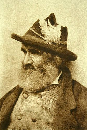 Hans Watzek Un Tyrolien [Photo-Club de Paris / 1894, Pl. LII] 1894 OR: Studienkopf [Wiener Photographische Blätter: Herausgegeben Vom Camera-Club In Wien] 1894, January